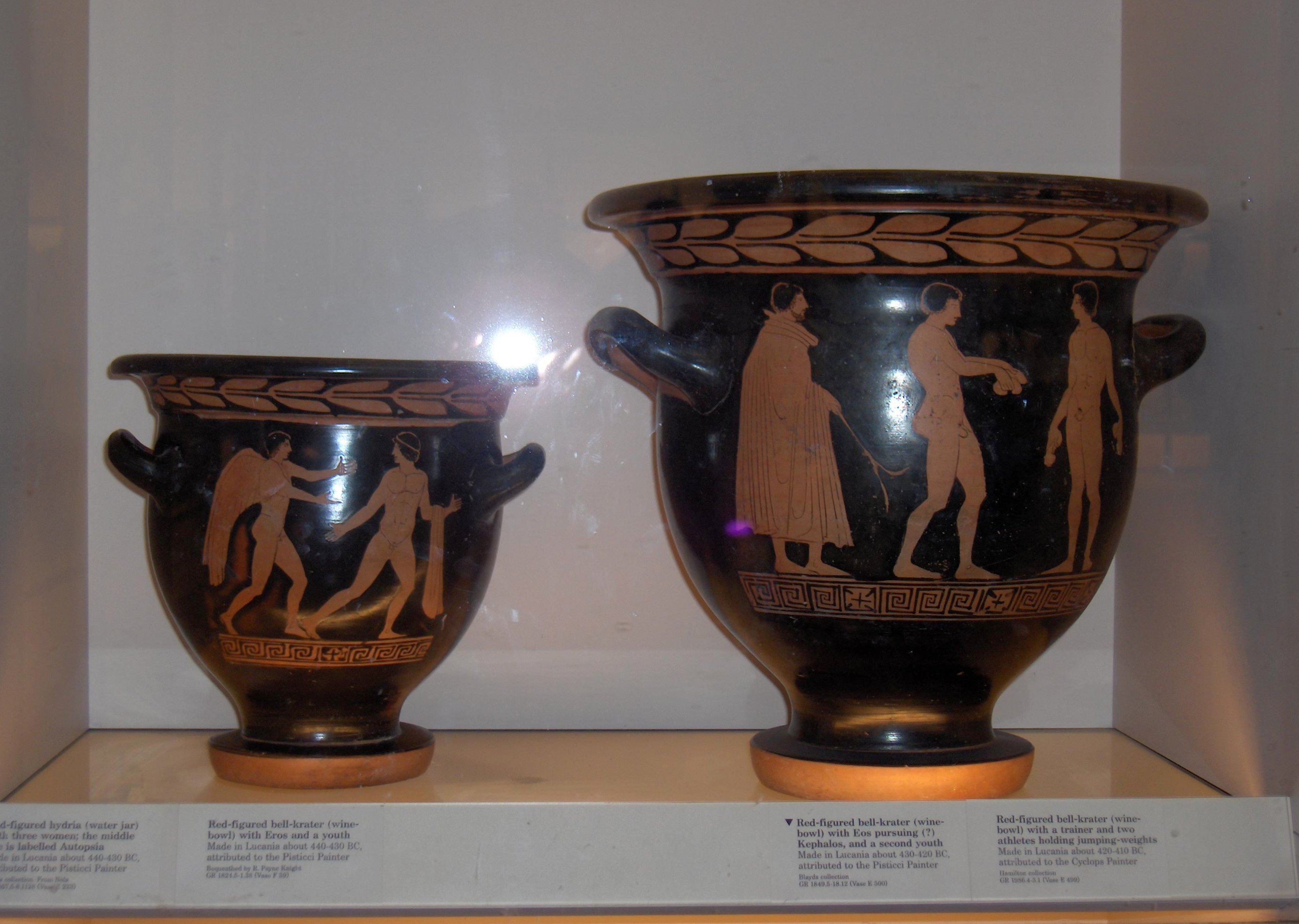 Immagine propria